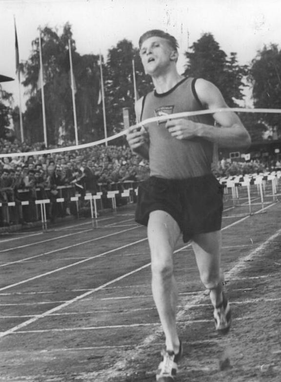 Zentralbild TBD-Wehse 4.9.1955 -3134- VI. DDR-Leichtathletikmeisterschaften in Jena Im Jenaer Ernst-Abbe-Stadion fanden in der Zeit vom 2. bis 4. September 1955 die VI. Leichtathletikmeisterschaften der DDR statt. Die Titelkämpfe standen unter dem Zeichen der Vorbereitungen auf die Olympiade 1956 in Melbourne. UBz: Claus Probadnik (Lok Leipzig) passiert nach 3:21,4 Min. beim 10.000-Meter-Lauf das Ziel und sicherte sich damit den Titel eines DDR-Meisters 1955.